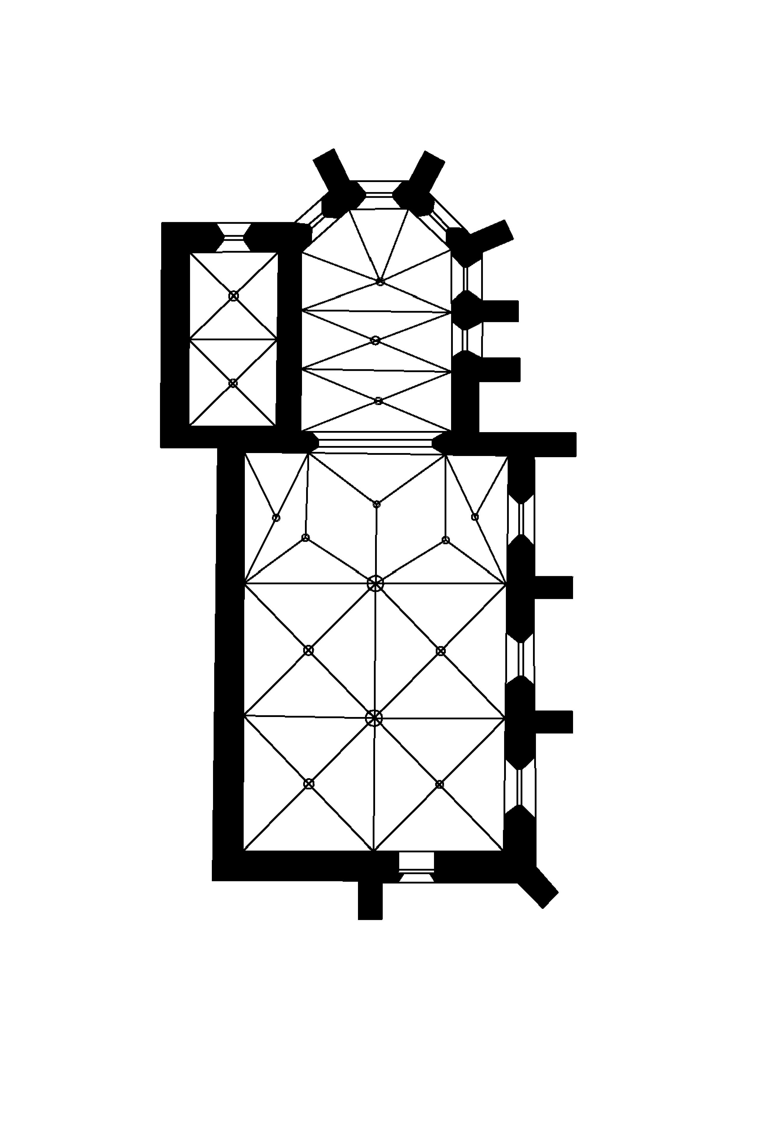 Půdorys kostela sv. Víta v Soběslavi. Orientace prebitária směřuje na východ. (horní část obrázku - východ)